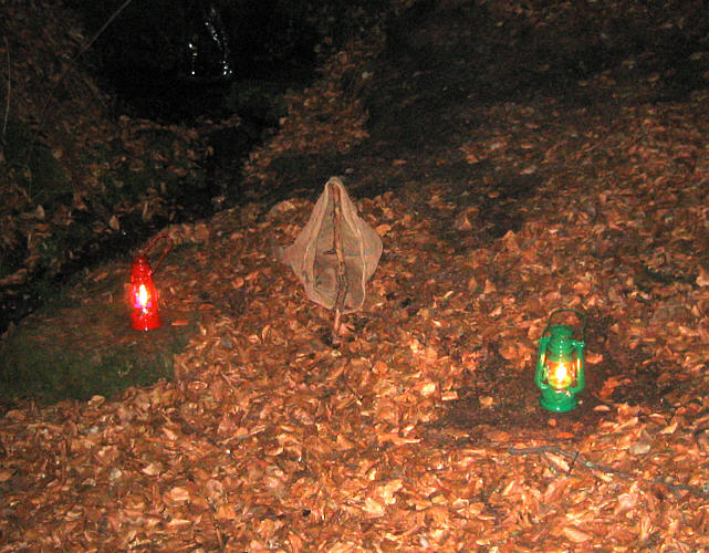 Falle zur nächtlichen Jagd von Elwetritschen im Pfälzer Wald.